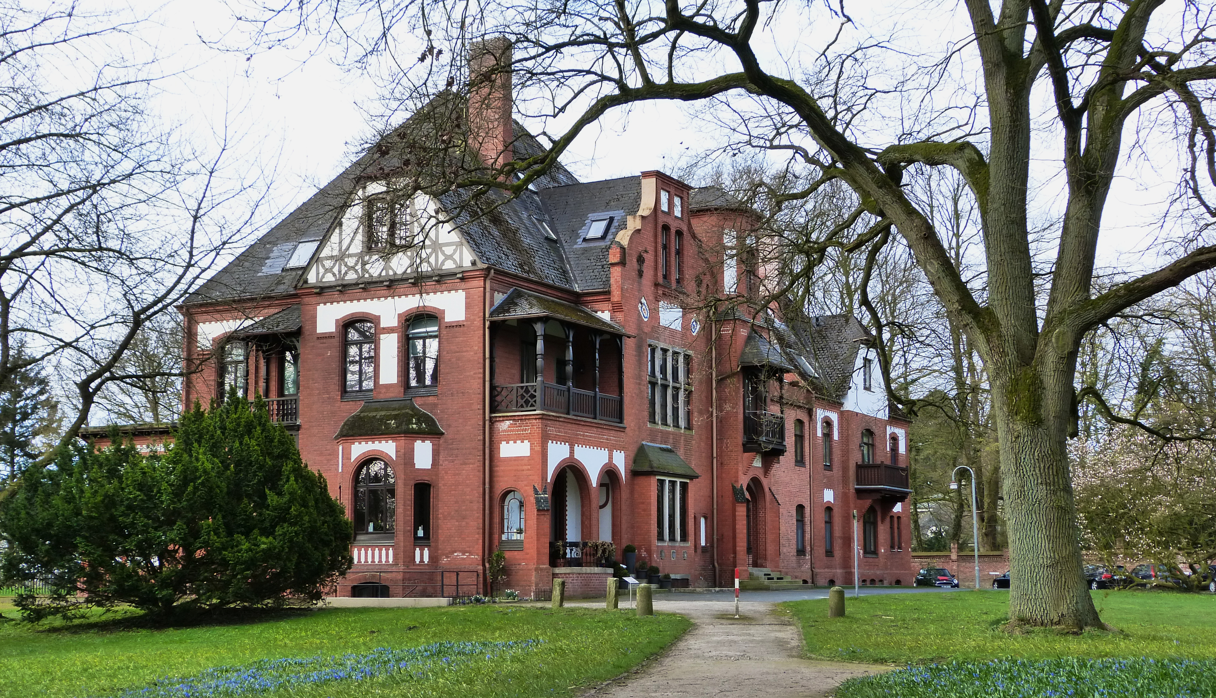 Landhaus Wolde, Villa Schotteck in Bremen, Am Kapellenberg 3Das abgebildete Objekt ist ein geschütztes Kulturdenkmal in der Freien Hansestadt Bremen, mit der Nr. 1275 beim Landesamt für Denkmalpflege registriert.